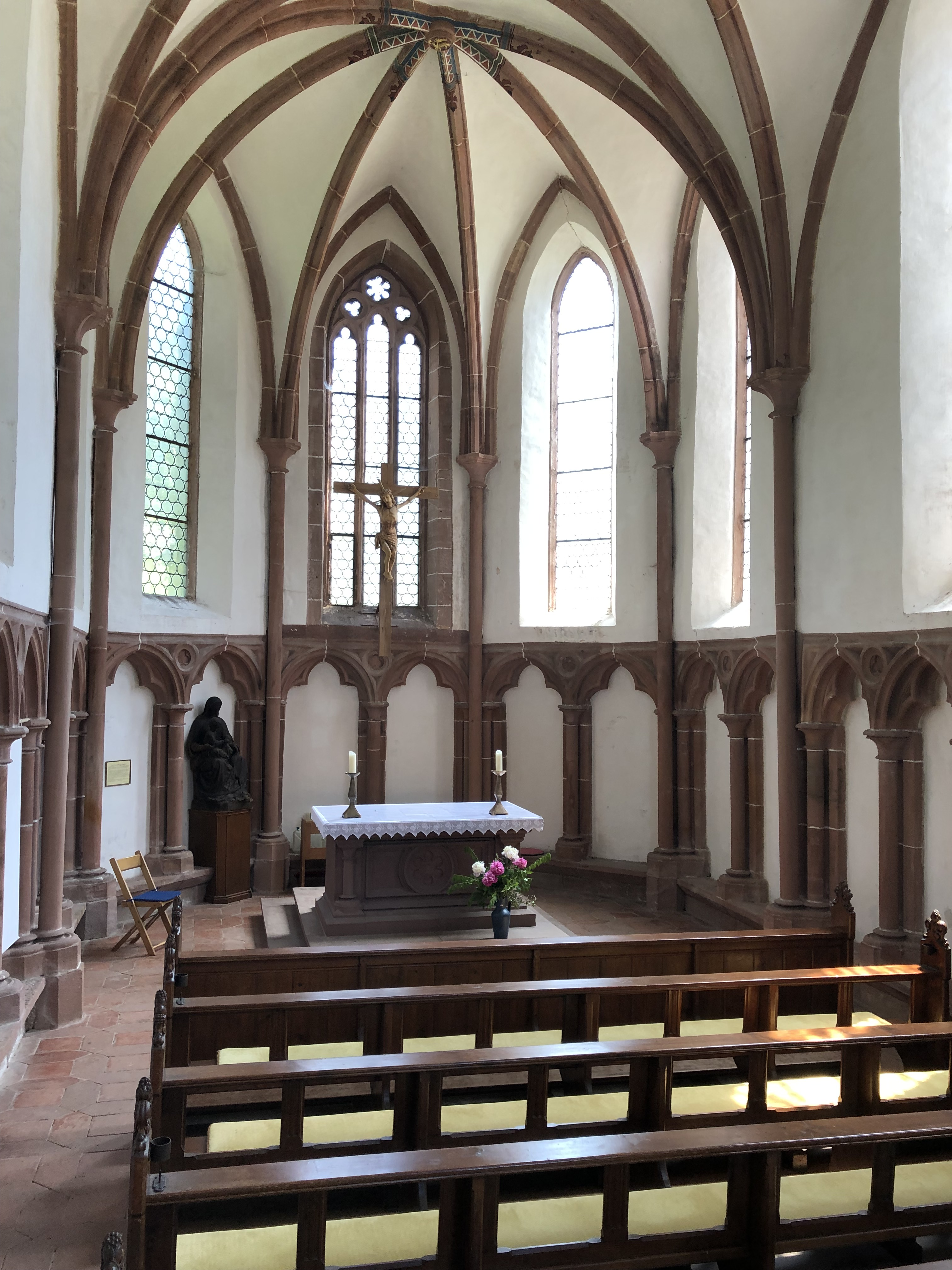 Kloster Tennenbach Kapelle